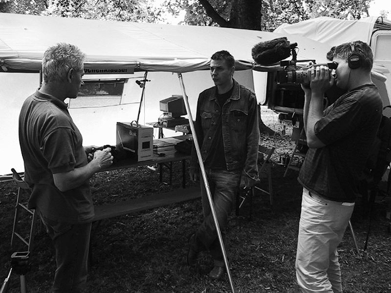 Von links: Künstler Hartmut Skerbisch (†), Wolfgang Zinggl ("Wochenklausur") und Regisseur Nikolas Geyrhalter